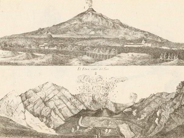 Volcanes Etna y Vesubio por Rodolfo Amando Philippi en 1868